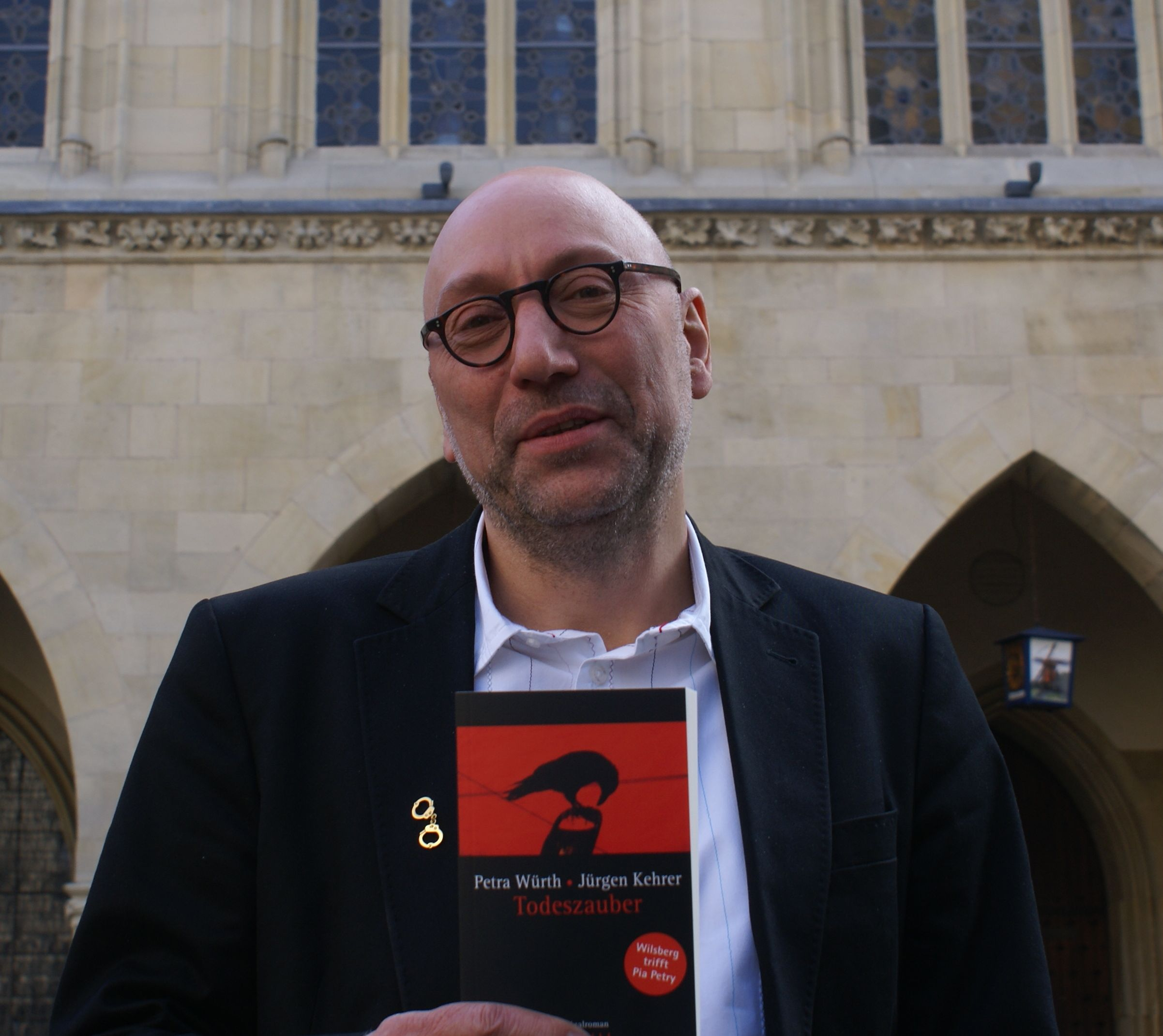 Jürgen Kehrer bei einer Buchvorstellung in Münster am 8. Oktober 2007